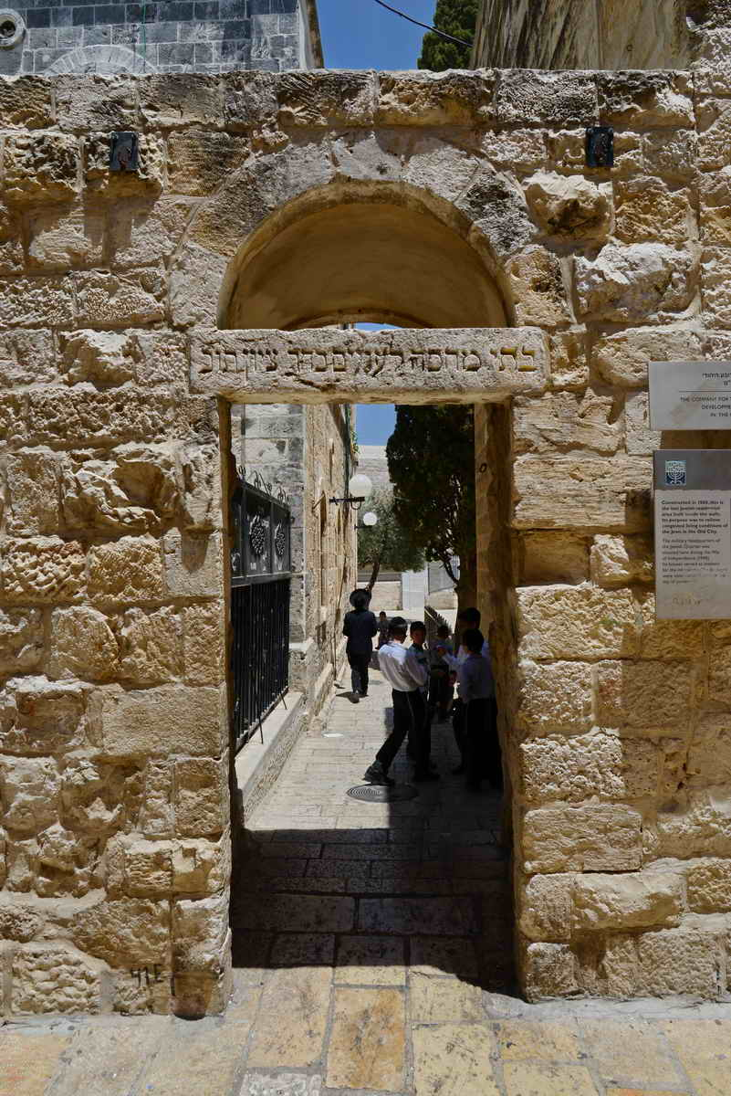 "בתי מחסה" הוא מתחם דירות לעניים שהקים כולל הו"ד בשנת 1857 ברובע היהודי בעיר העתיקה שבירושלים.